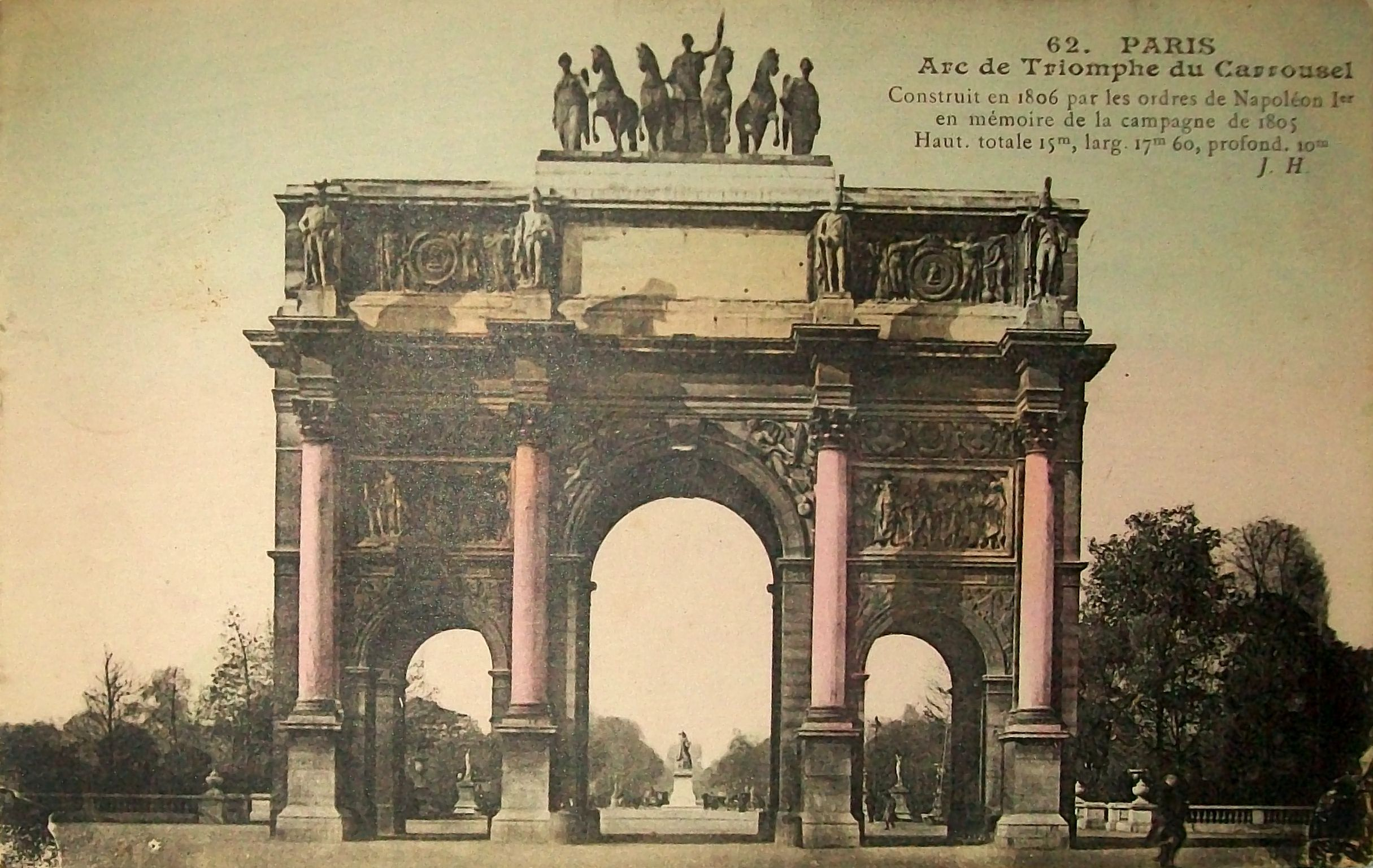 Pohľadnica z roku 1900, Arc de Triomphe du Carrousel, víťazný oblúk z roku 1809 postavený Napoleonom